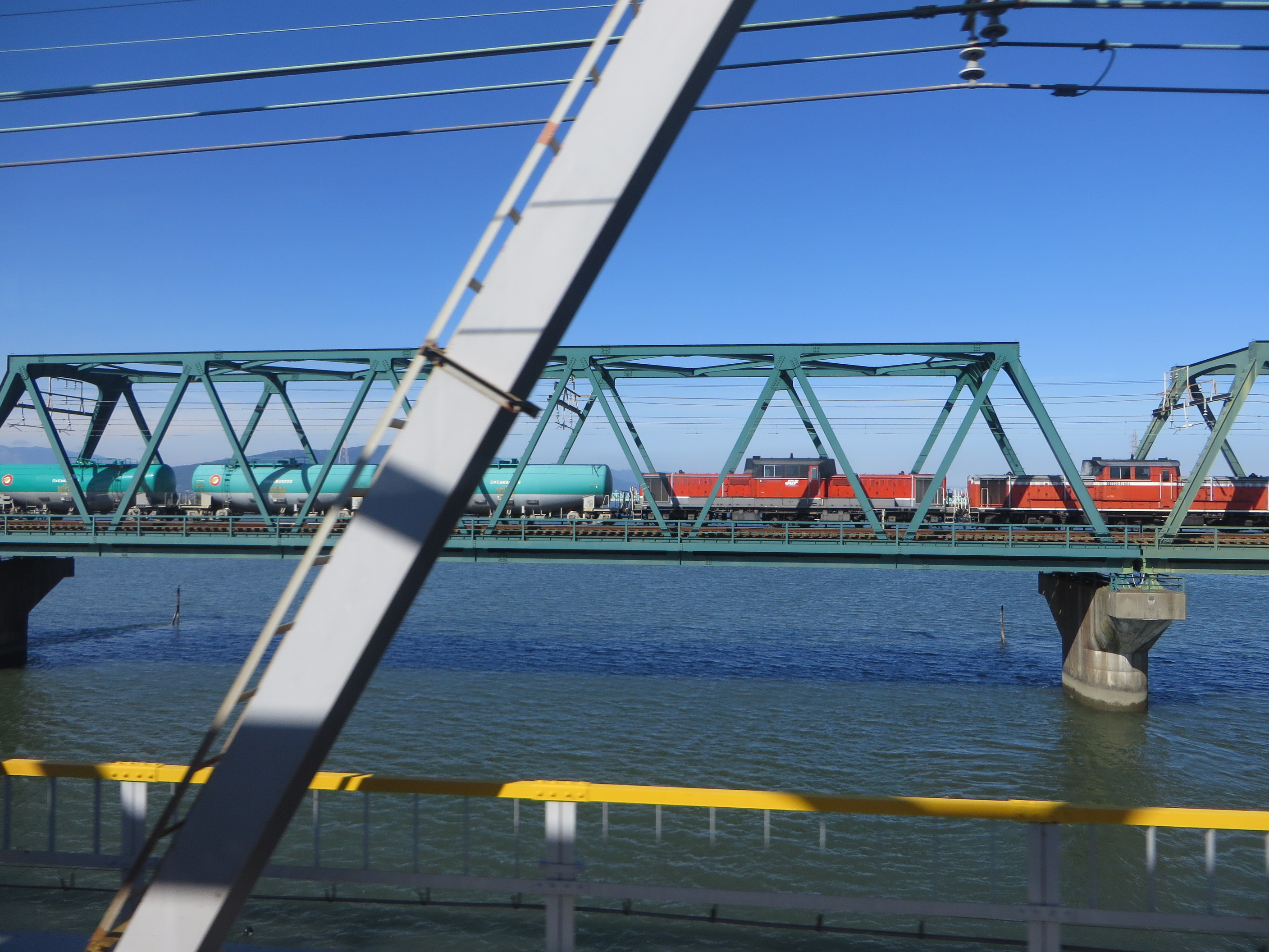 木曽川